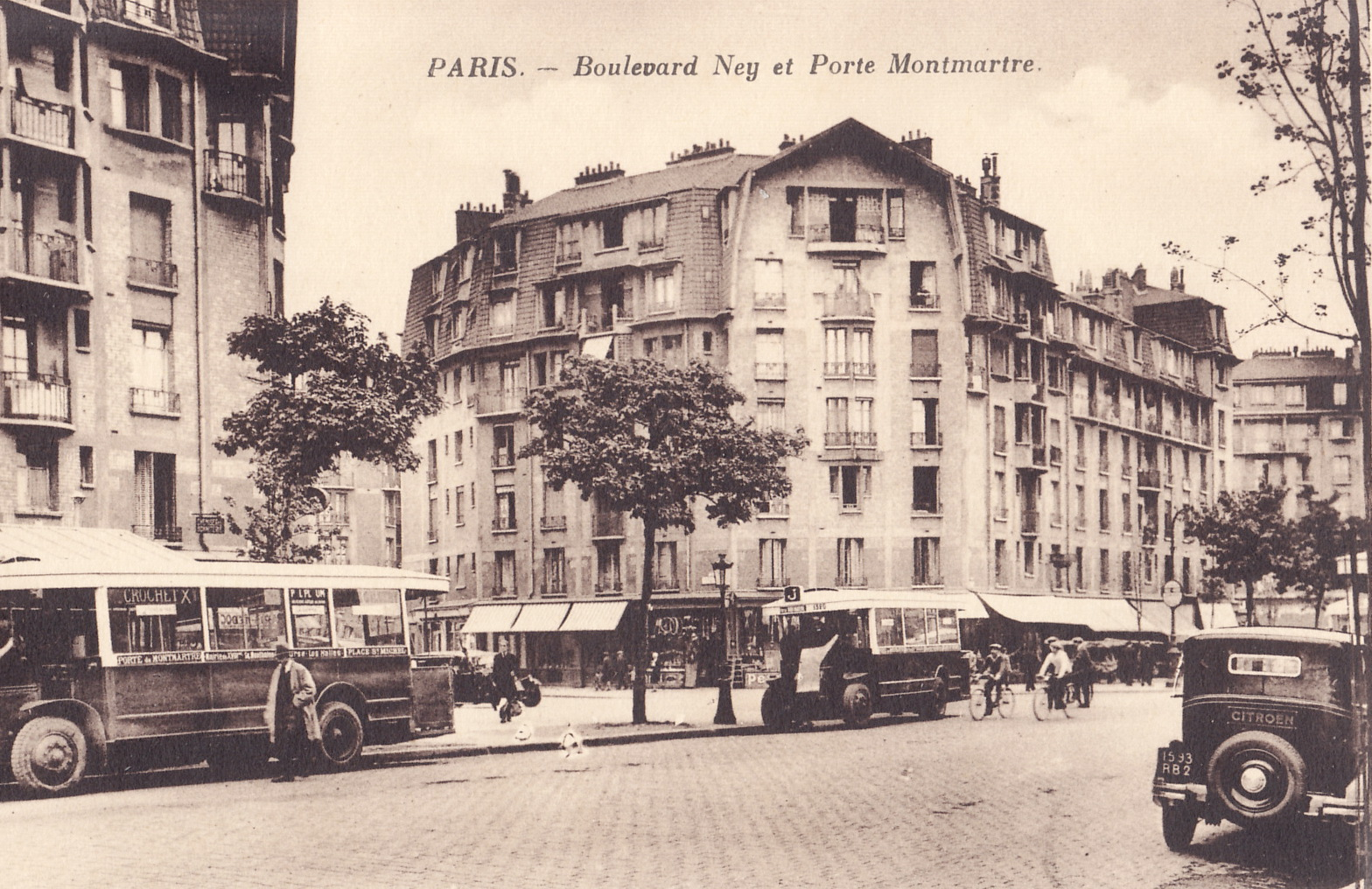 Carte postale ancienne éditée par ¨Parbelle :PARIS - Boulevard Ney et Porte Montmartre